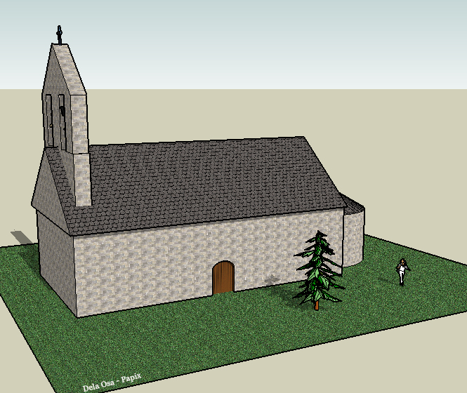 Reproduccion en 3d de la Ermita de Sant Quirc de Durro /( Cataluña ) lado E-W Source